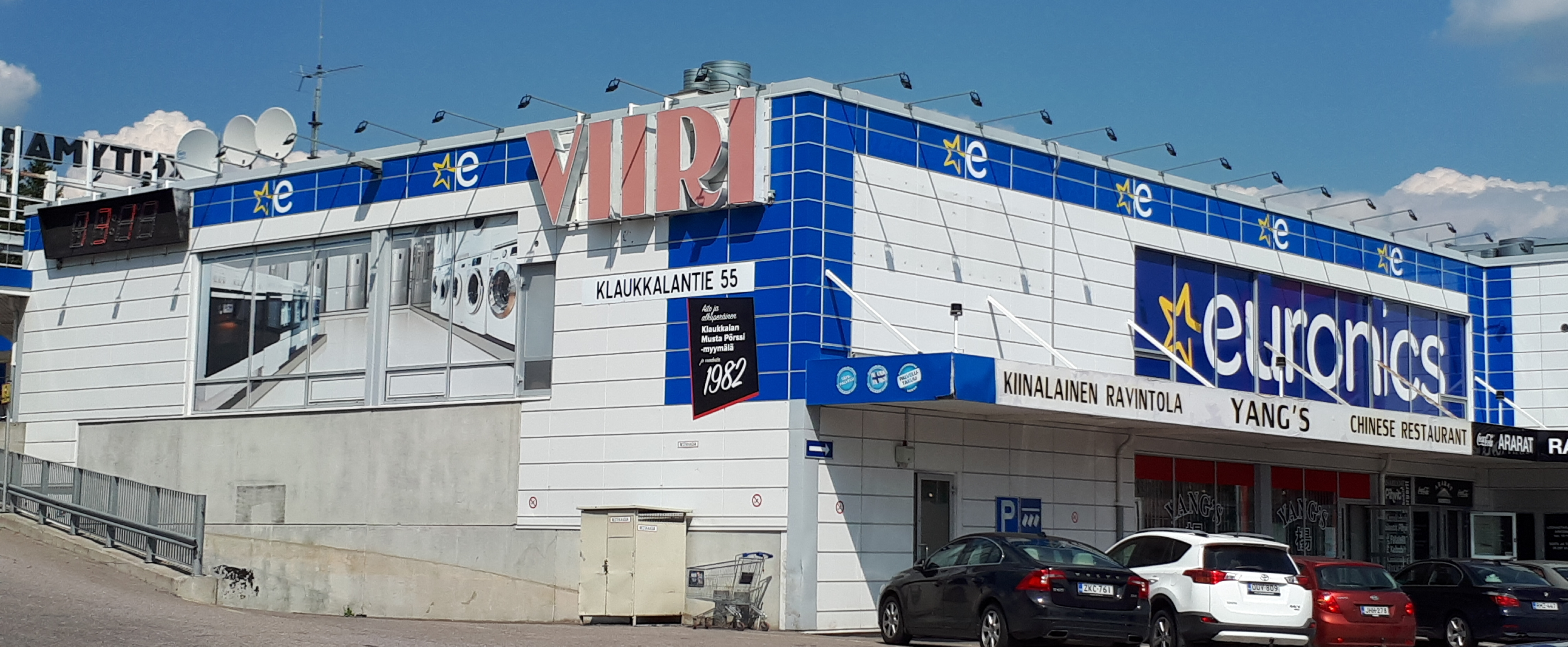 Klaukkalan Euronics-myymälä